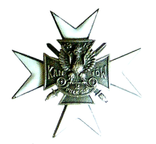 Odznaka pamiątkowa 2 psap